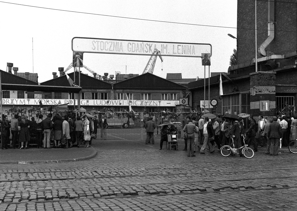 Brama nr 3 Stoczni Gdańskiej im. Lenina podczas strajku